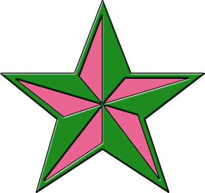 Estrella del Partido Bloquista de San Juan